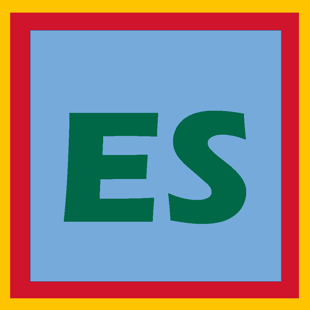 Logo del idioma español, con los colores de las banderas de España, México y Argentina